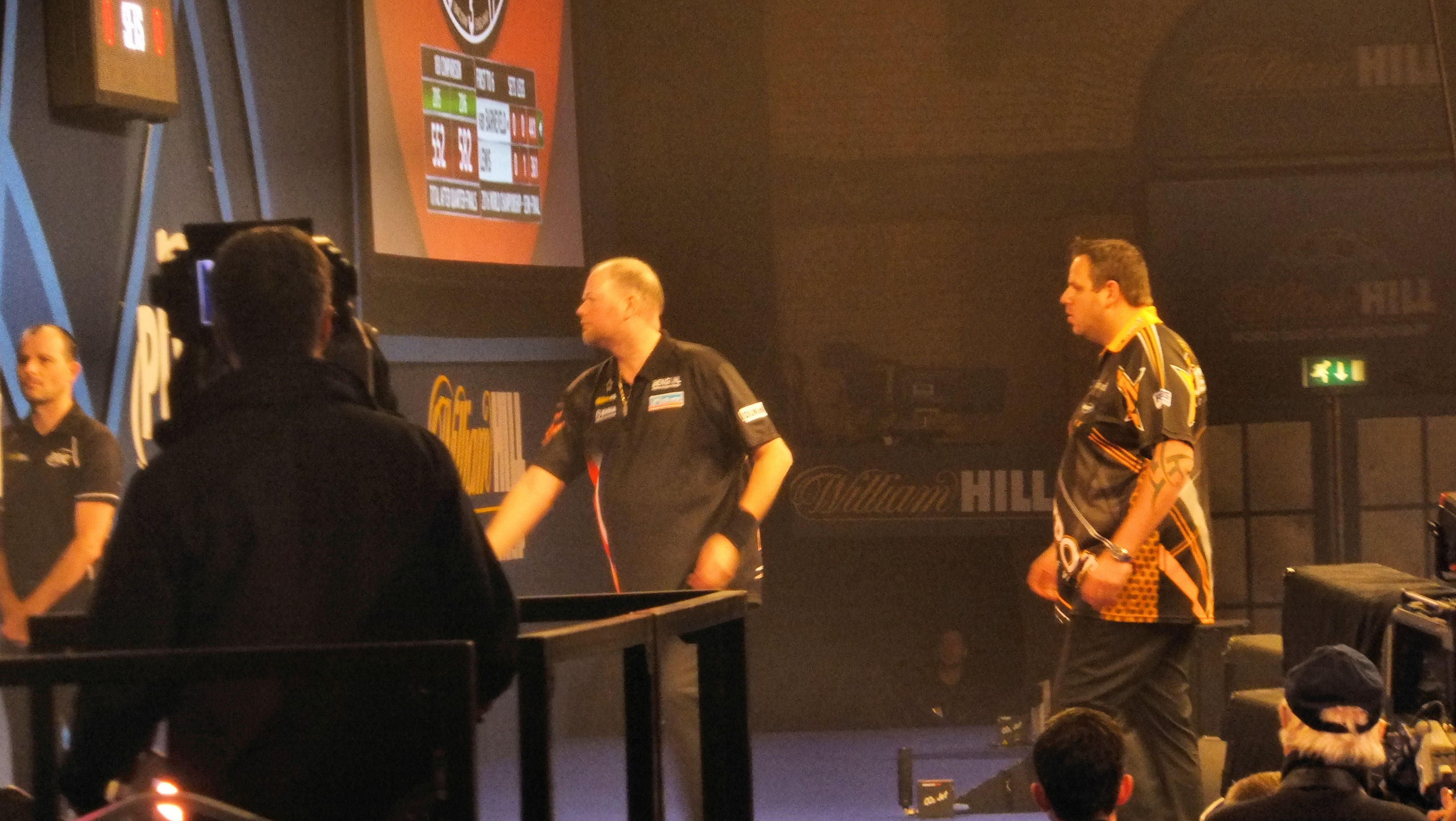 Raymond van Barneveld v Adrian Lewis